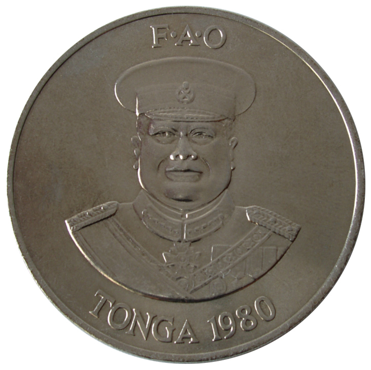 Tonga, 2 Pa'anga, 1980, back, d=45 mm, cu/ni